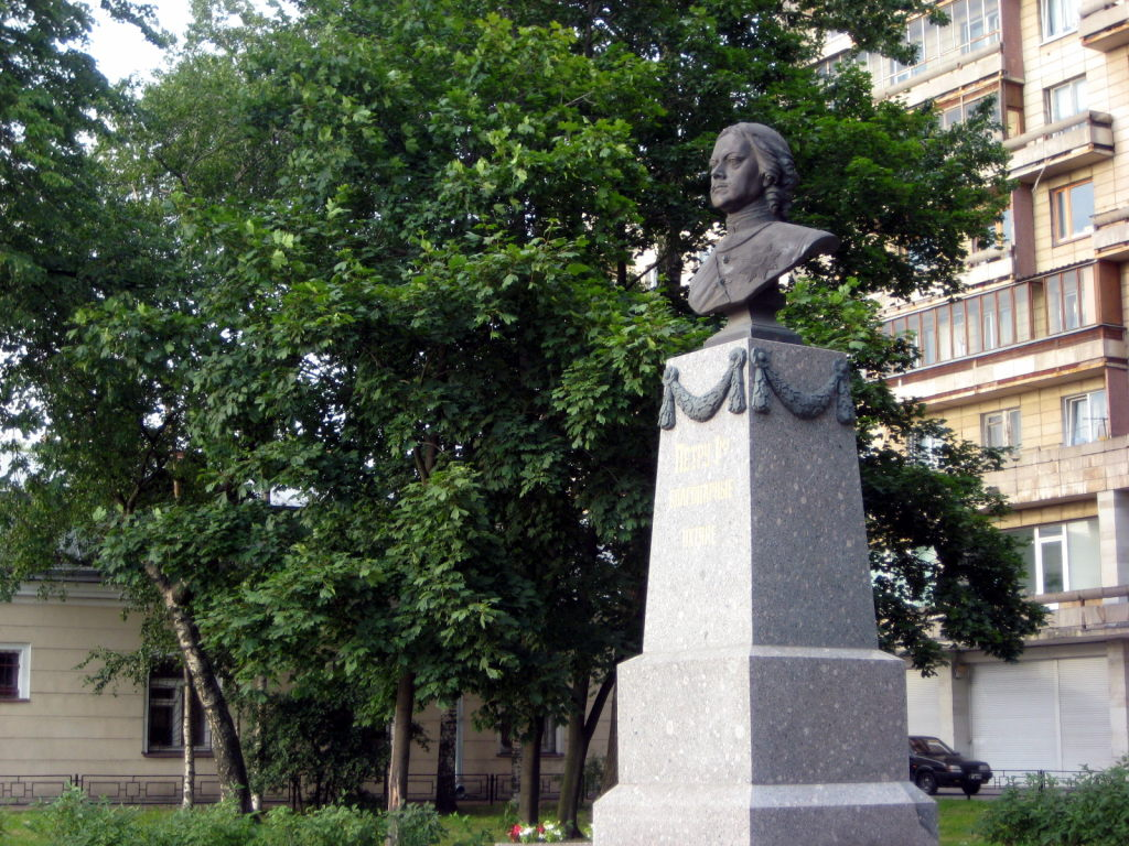 От благодарных Охтян